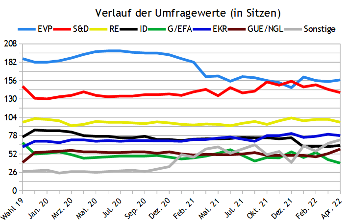 Umfragen zur Europawahl 2024